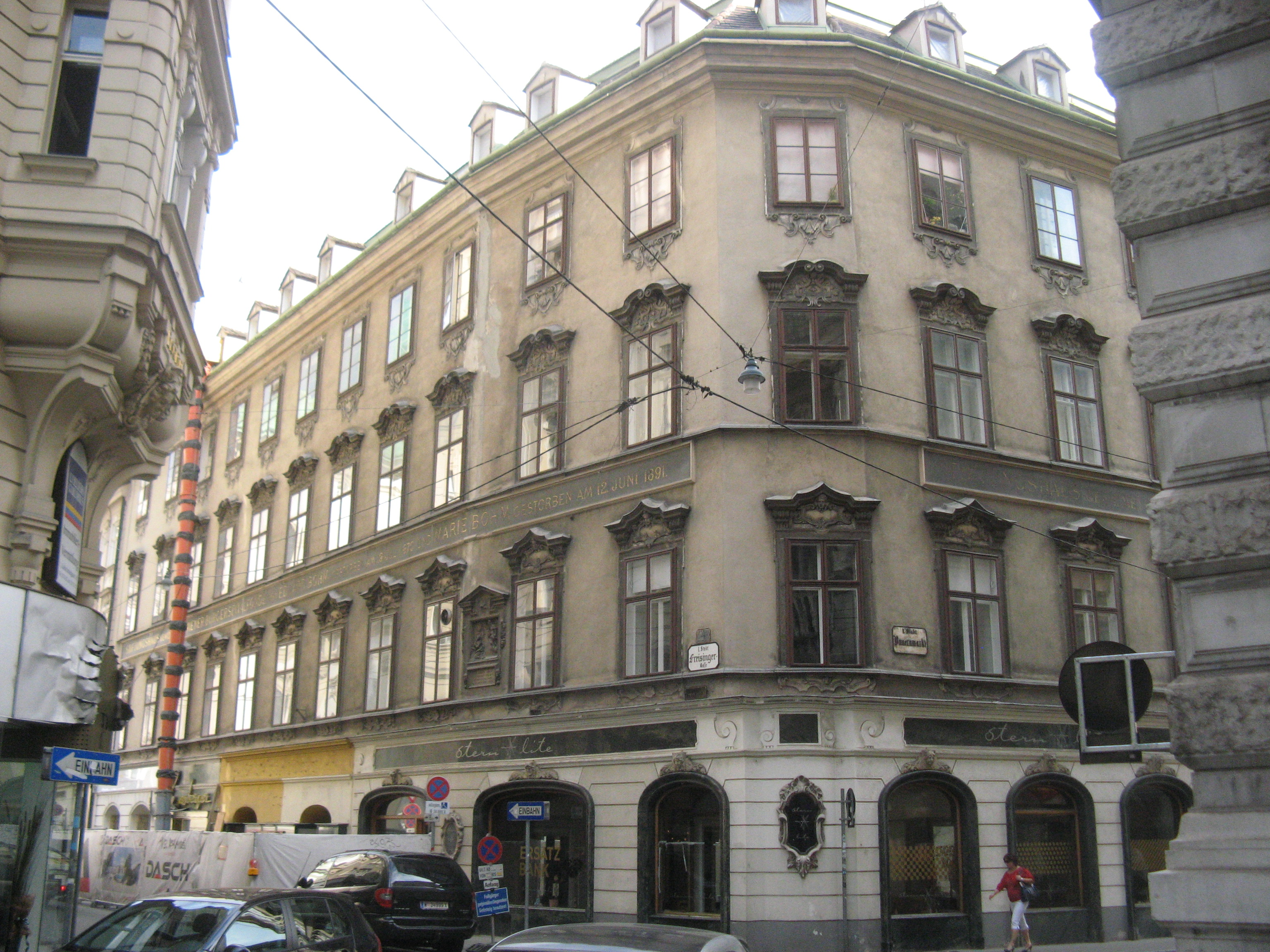 Oppenheimersches Haus, Bauernmarkt 1, Wien-Innere Stadt